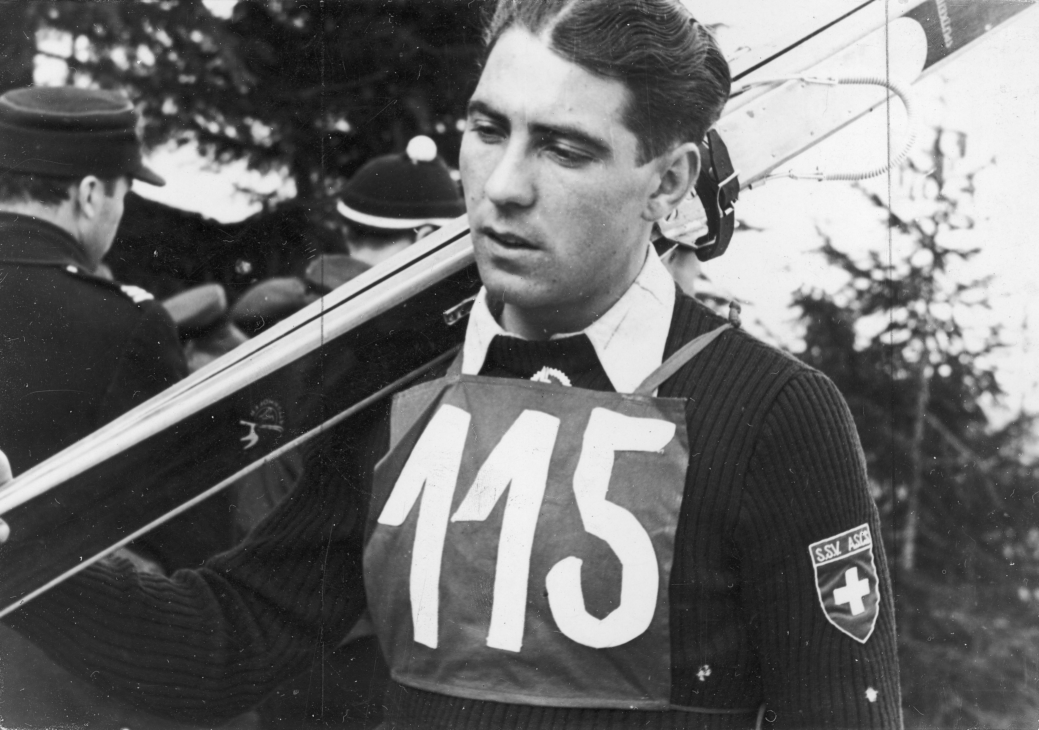 Adi Gamma à Zakopane en 1939